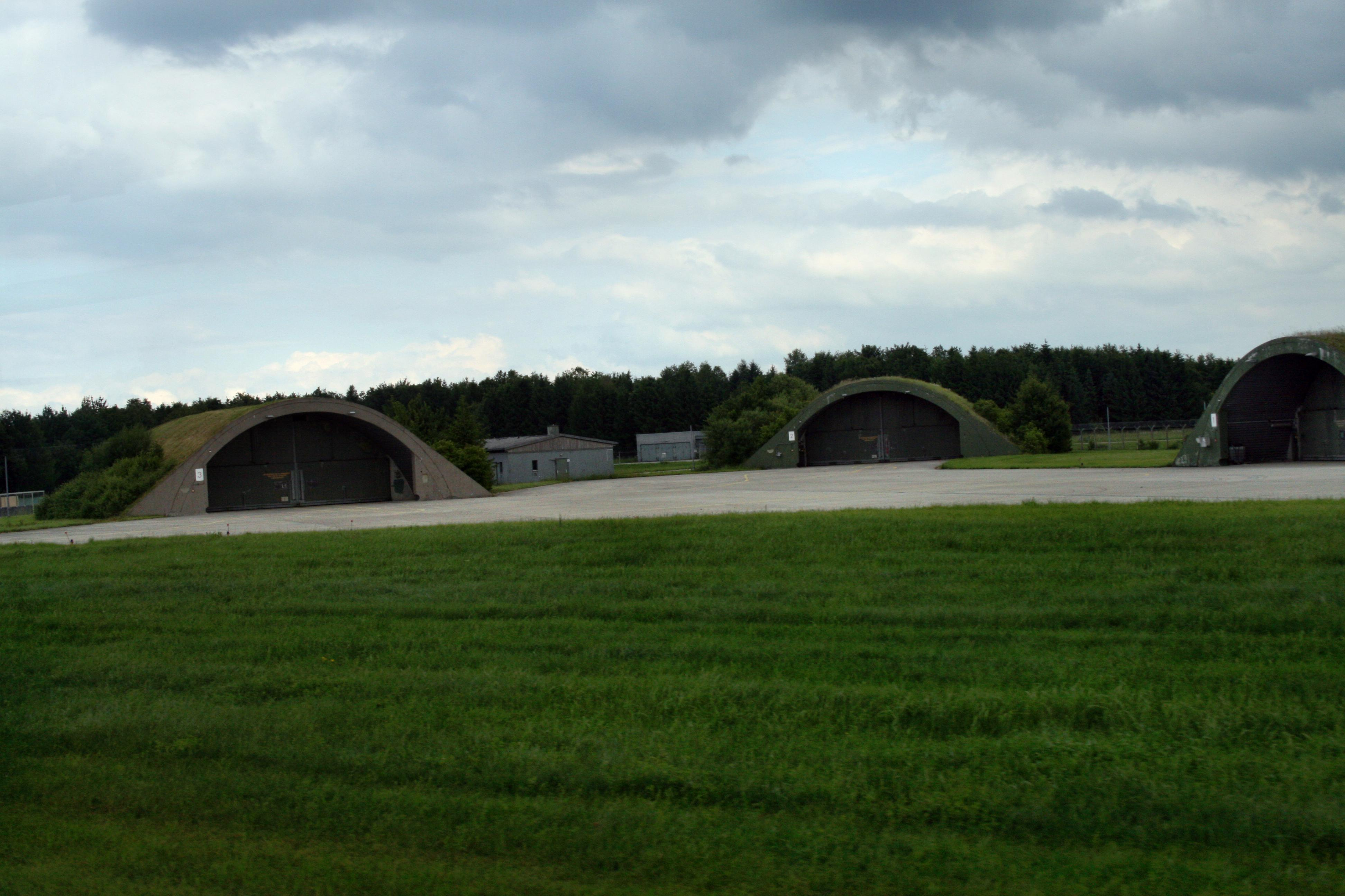 Alte Shelter aus der Bundeswehrzeit auf dem Allgäu Airport